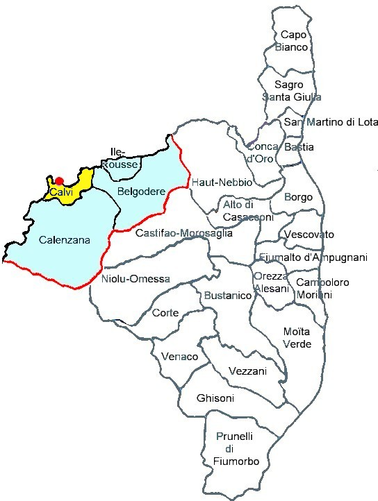 Localisation du canton de Calvi, Balagna, Haute-Corse